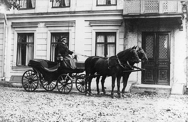 Utanför Fogelsta gårds huvudbyggnad omkring år1920. På kuskbocken kusken Alexandersson.